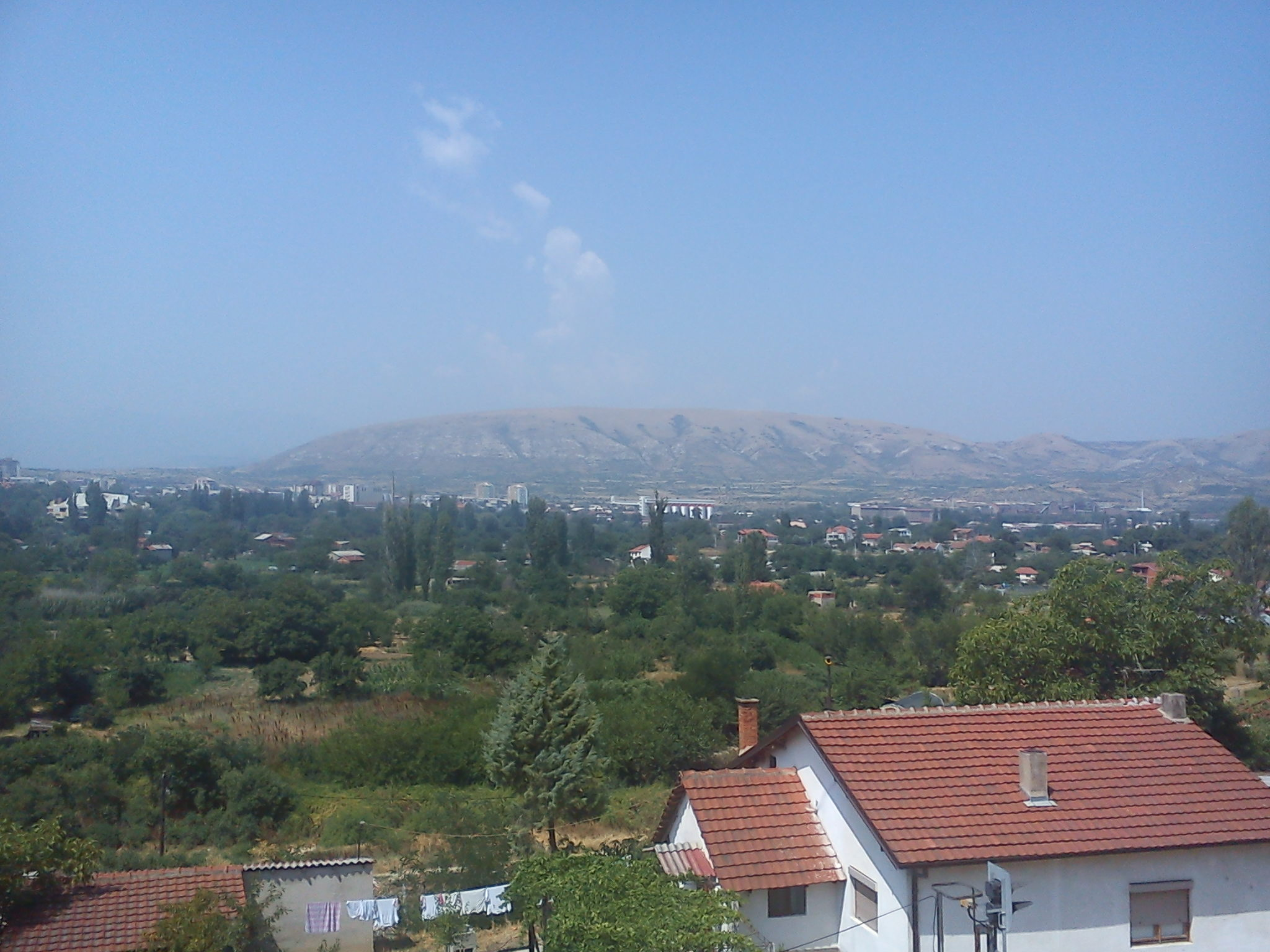 Ридот Гроот во Велес